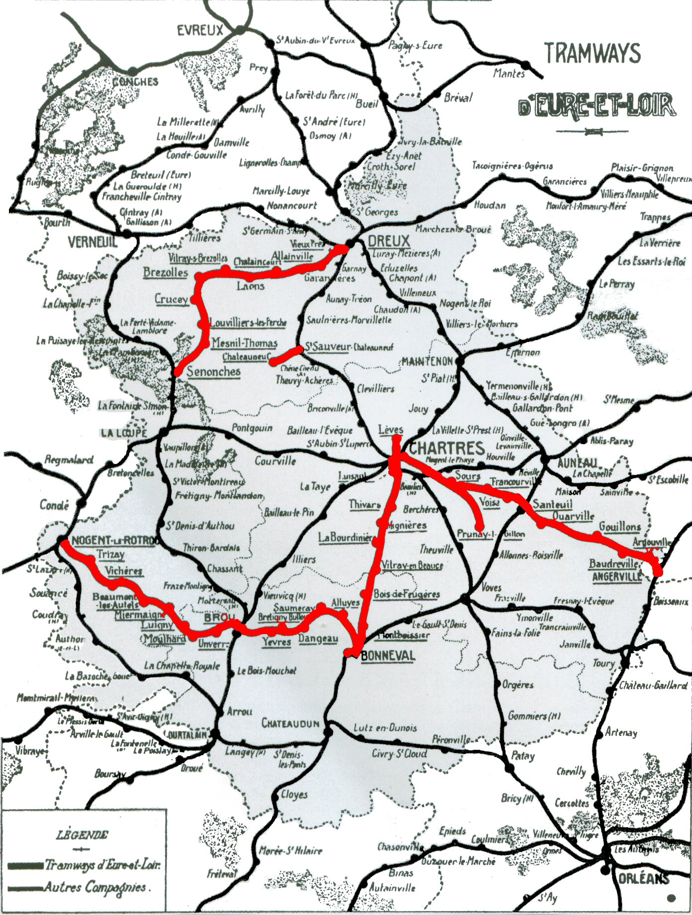 carte des lignes des Tramways d'Eure-et-Loir et des lignes de chemins de fer à voie normale d'Eure-et-Loir (plan antérieur à 1907, la ligne Paris-Chartres par Gallardon n'y figurant pas.)